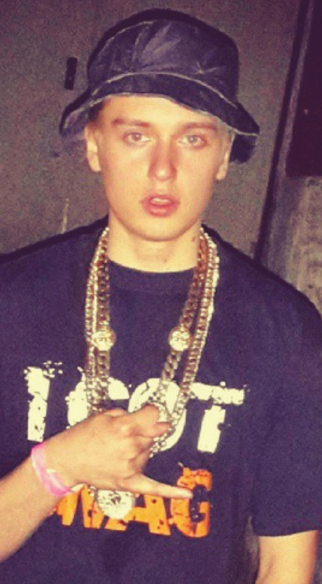 Der Rapper Hustensaft Jüngling nach einem Auftritt in Herbolzheim.